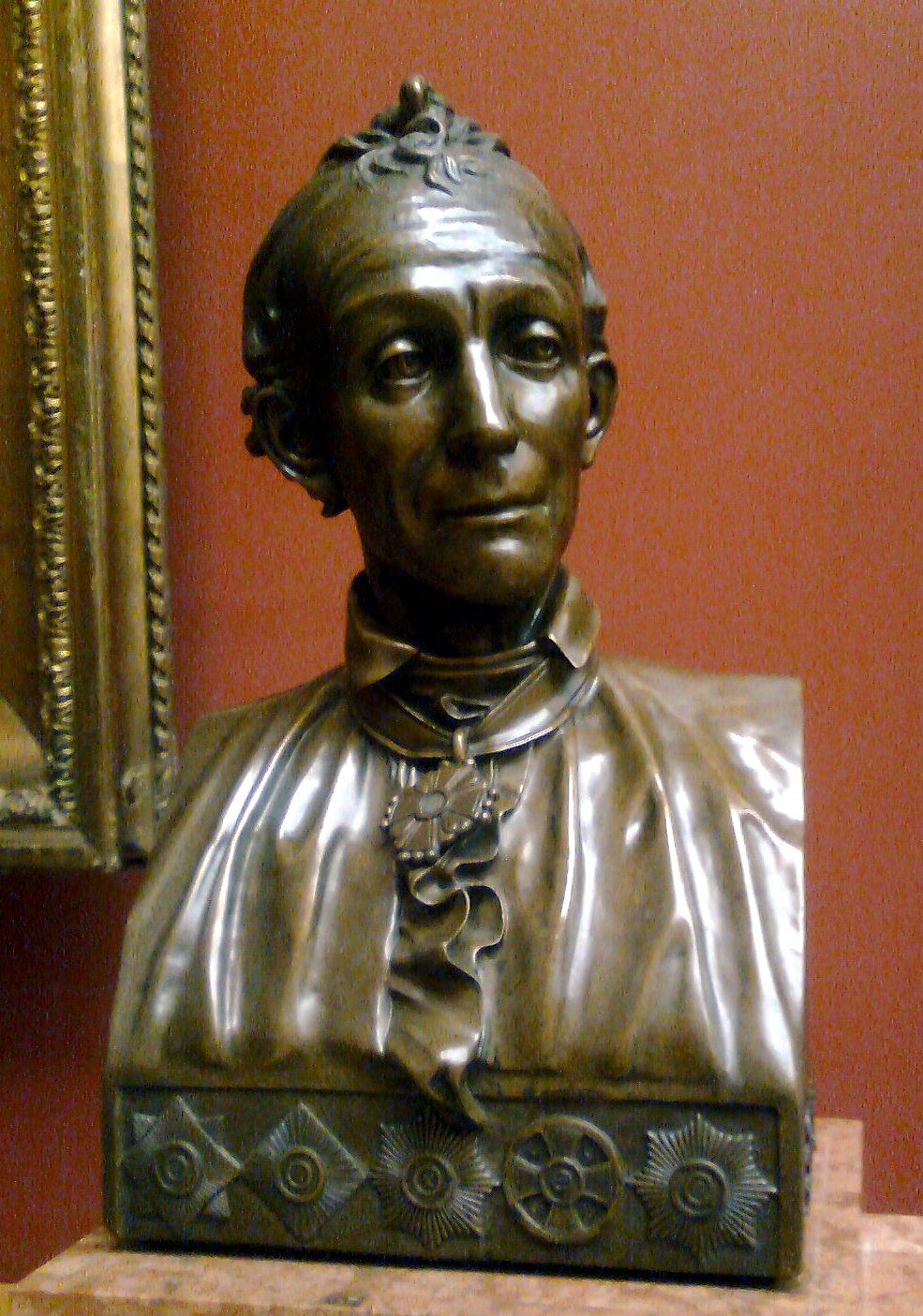 В. И. Демут-Малиновский Портрет А. В. Суворова. 1814 Отлив середины XIX века Бюст. Бронза. 80 х 34 х 31 Слева надпись: Суворовъ Пост. в 1935 из артели «Металлург», Ленинград Ск-418. Государственный Русский музей, Санкт-Петербург